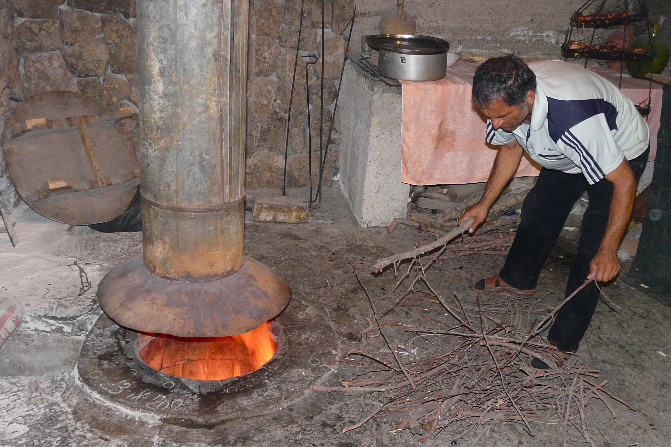 We worden uitgenodigd voor een lunch bij een lokale bewoner. In een open eethuisje gaat het heel gezellig! Op een hevig vuur in een diepe kuil wordt op de hete wandbekleding heel handig uitgerolde brooddeeg geworpen. Na enkele seconden kunnen de brood/pannekoeken door middel van een lange vork, opgepikt worden van de hete wand. Heerlijk smullen is dit! Op een rooster boven de opening worden naar wens groenten en vlees geroosterd.